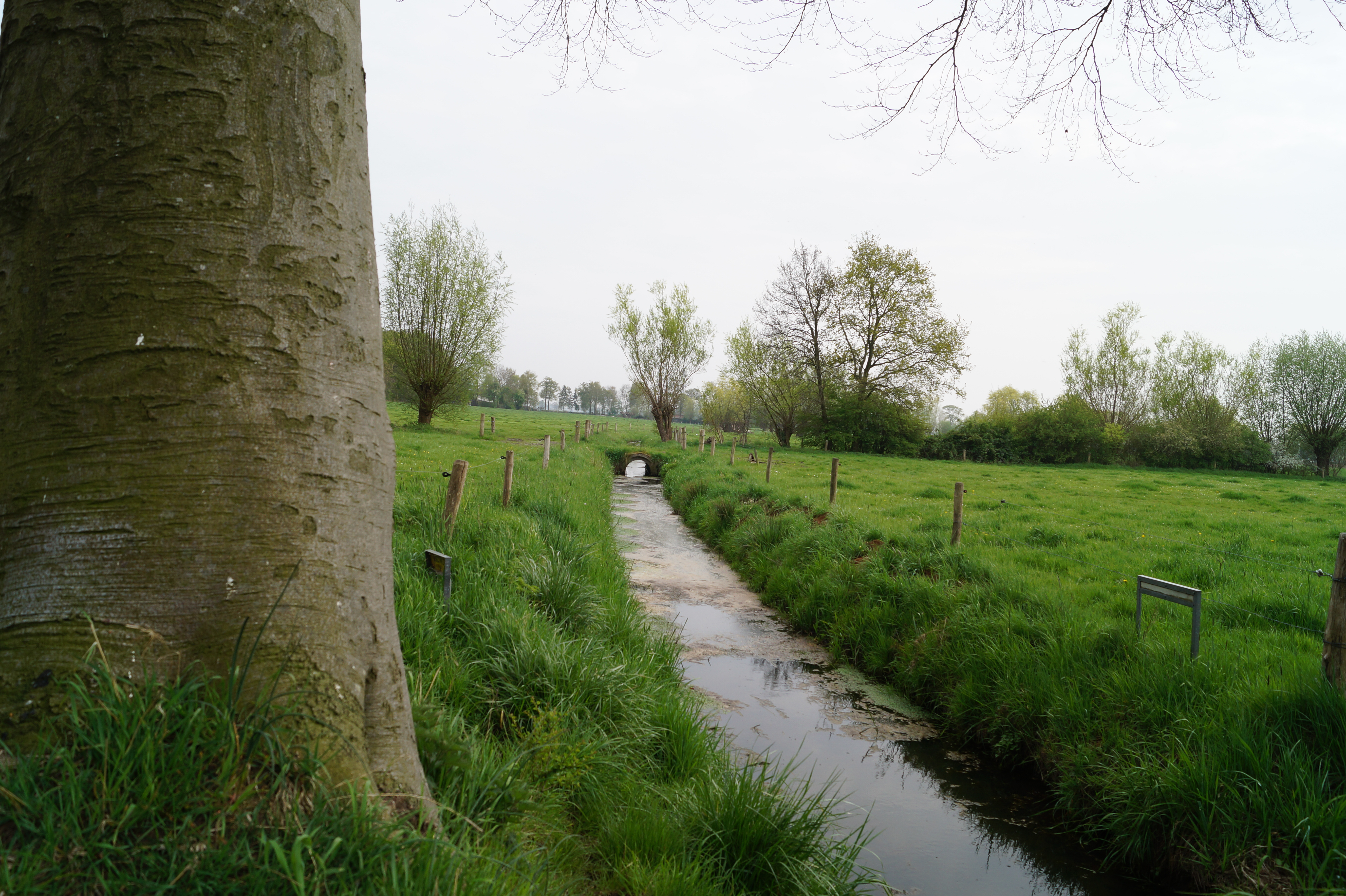 Smalle Beek near Wouw, Netherlands